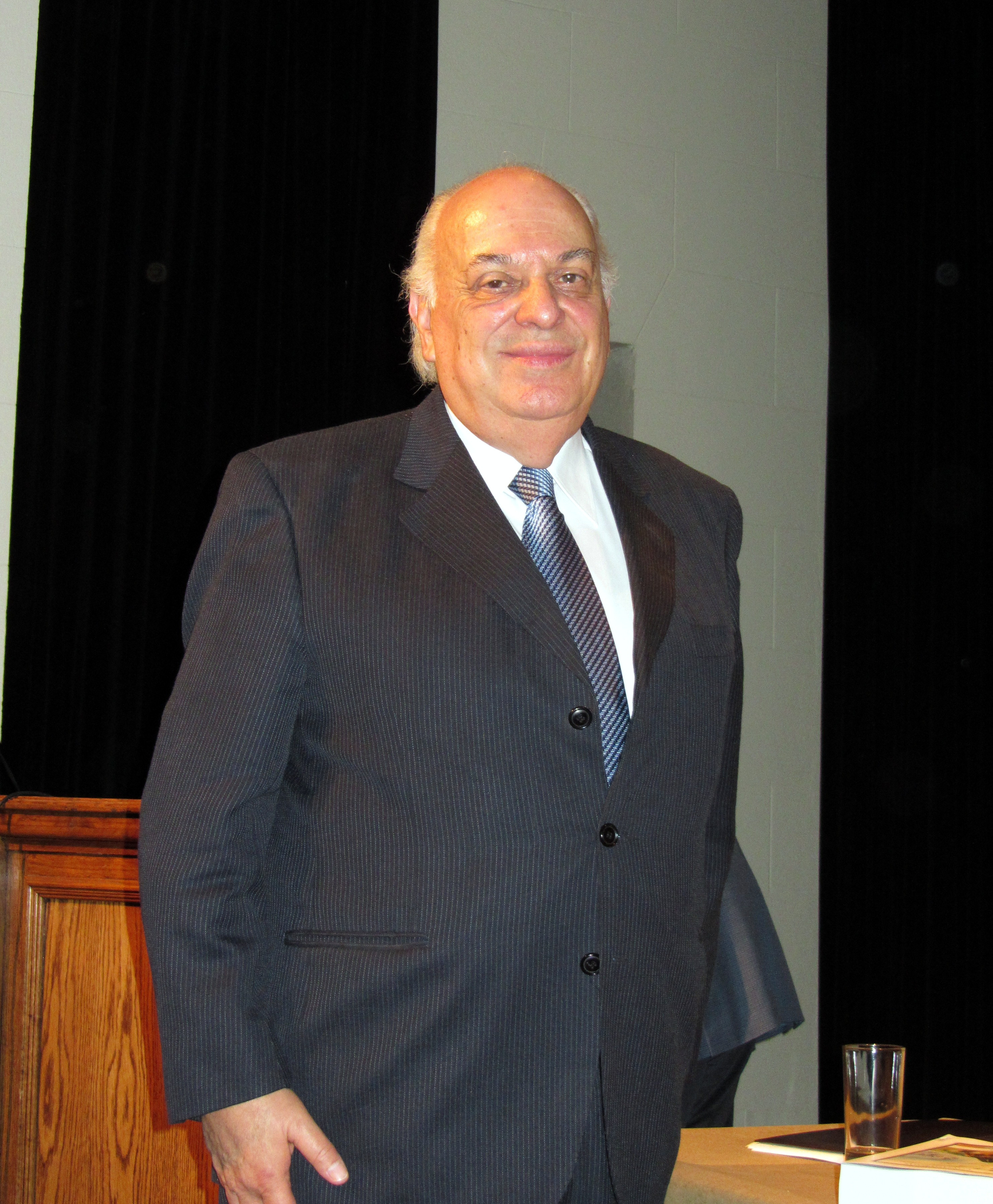 El lingüista Alfredo Matus Olivier, director de la Academia Chilena de la Lengua, en la Biblioteca Nacional, presentación del libro Íntegra de Gonzalo Rojas, 25 de abril de 2013